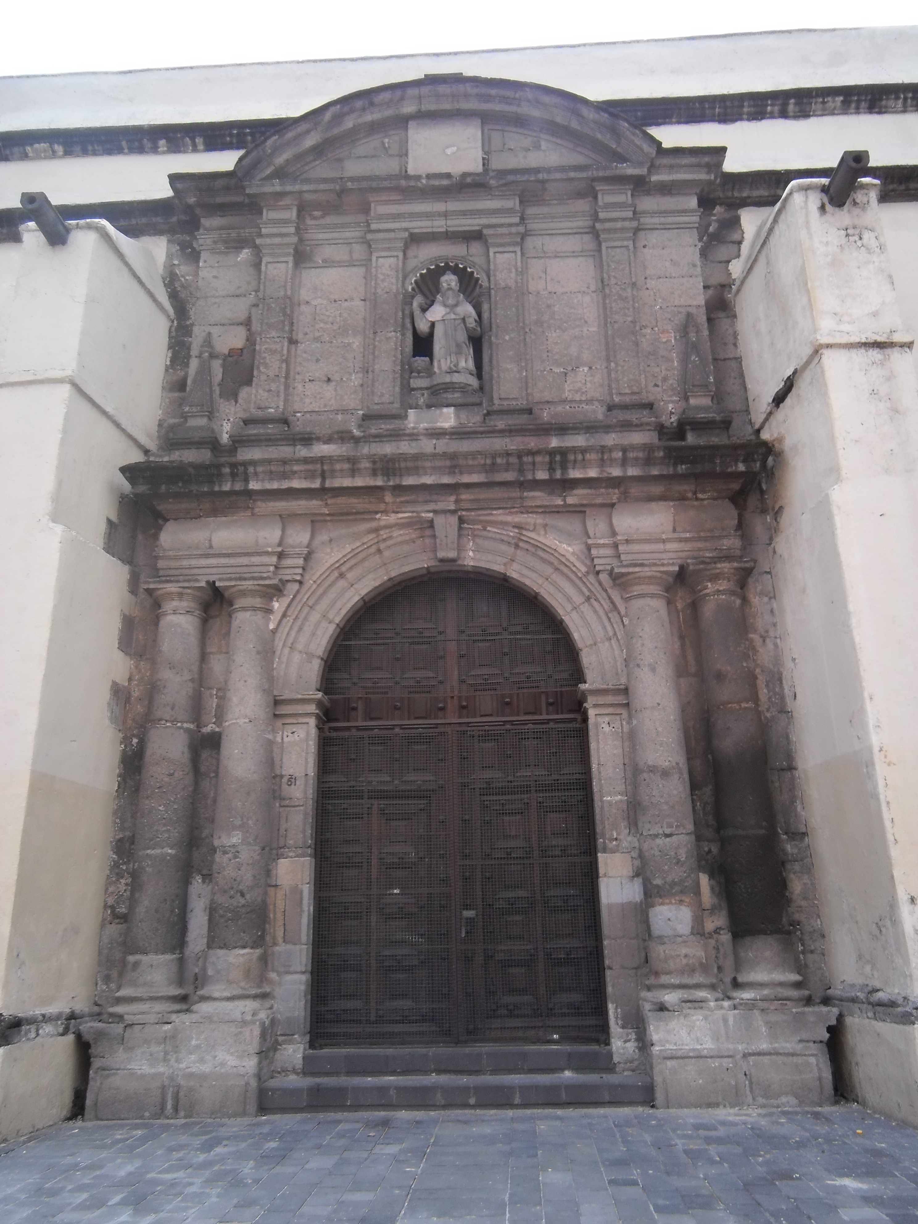 Fachada del Convento de San Jerónimo